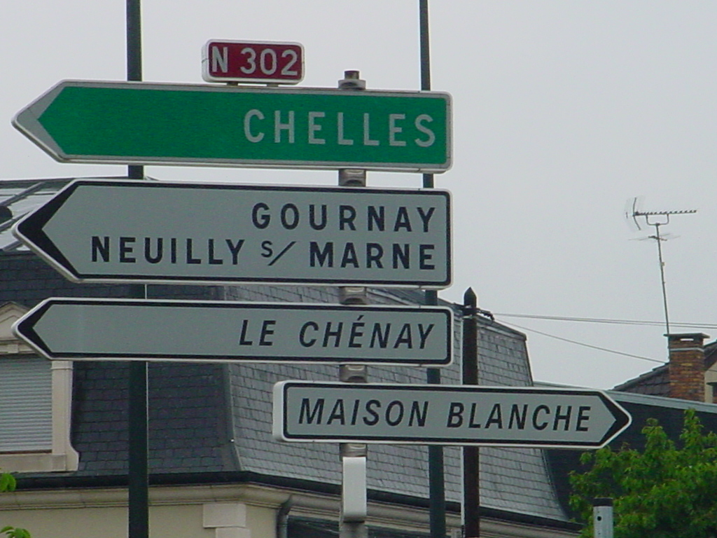 photo collection personnel Utilisateur:Freddyz Photographie libre de droit sans copyright non soumise à autorisation Catégorie:Signalisation routière de direction